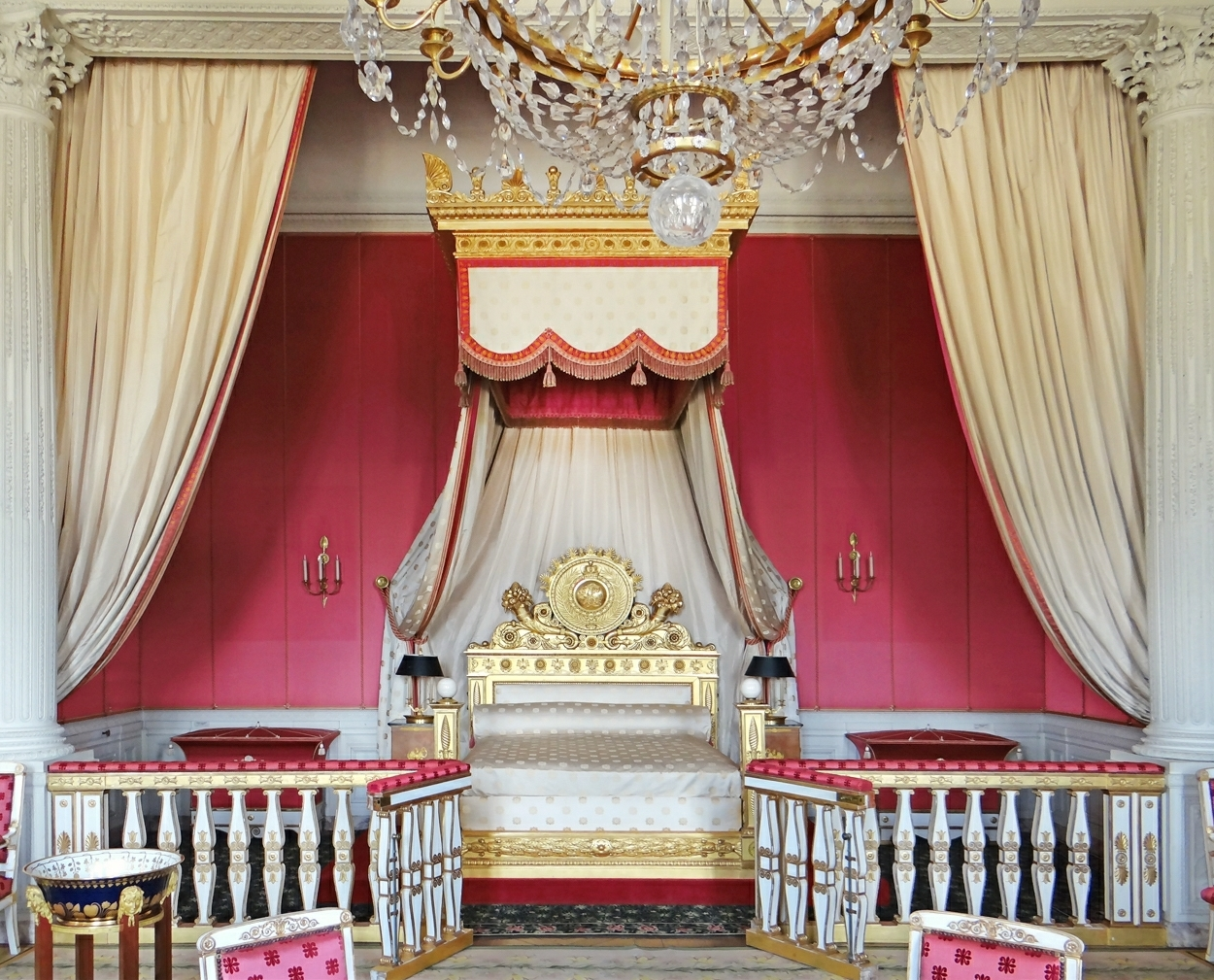 La chambre de l'Impératrice La chambre a été créée en 1691. Au XIXème siècle, elle a été affectée à Madame Mère, à Marie-Louise, puis à Marie-Amélie. Le lit en bois doré et baldaquin est de Jacob-Desmalter (1809) __________ Le Grand Trianon a été élevé par Jules Hardouin Mansart en 1687...Très influencé par l’architecture italienne, ce palais s’étend sur un seul niveau, placé entre cour et jardin, recouvert d’un toit plat, dissimulé par une balustrade...extraits du site officiel